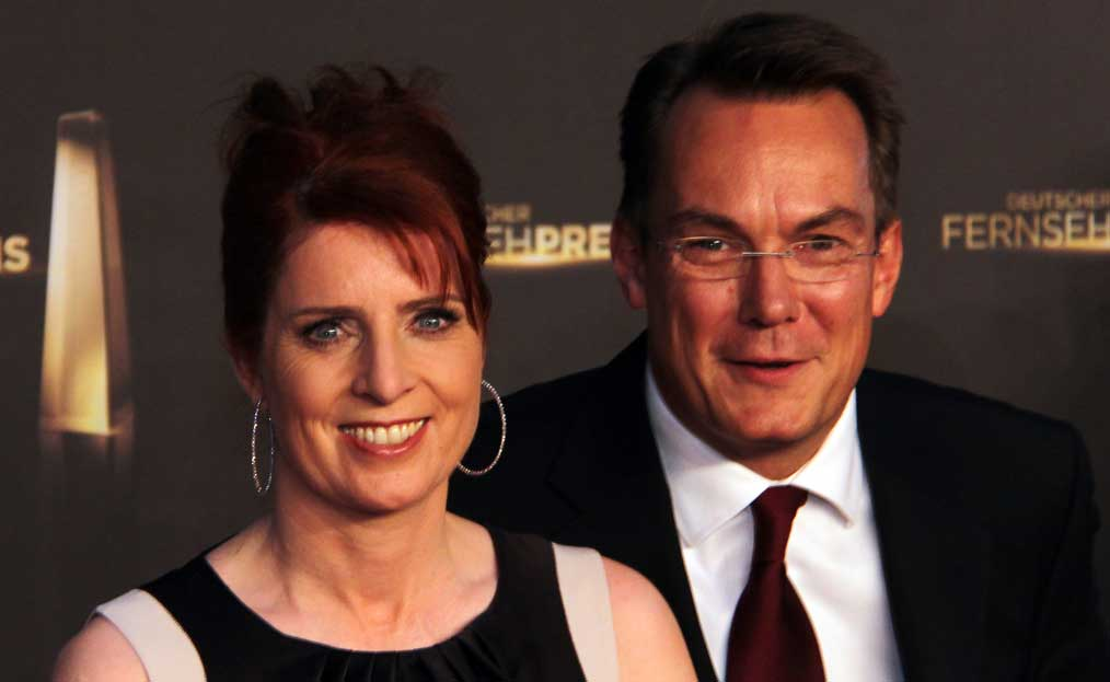 Monica Lierhaus und Rolf Hellgardt beim Deutschen Fernsehpreis 2012